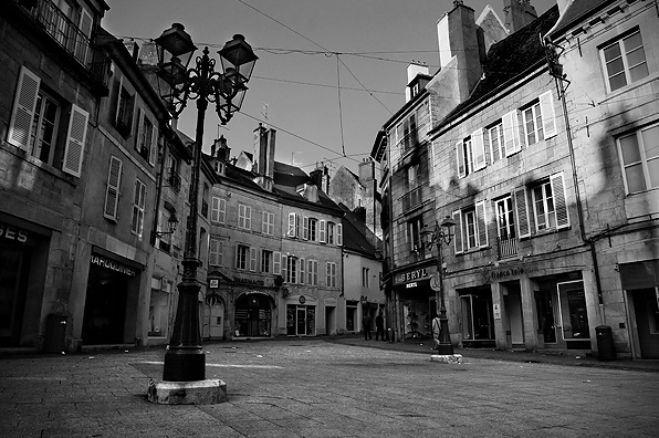 Place du 8 mai 1945